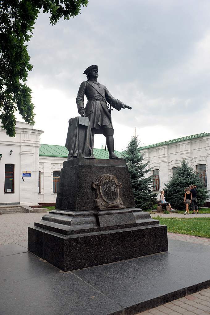 Петр Великий